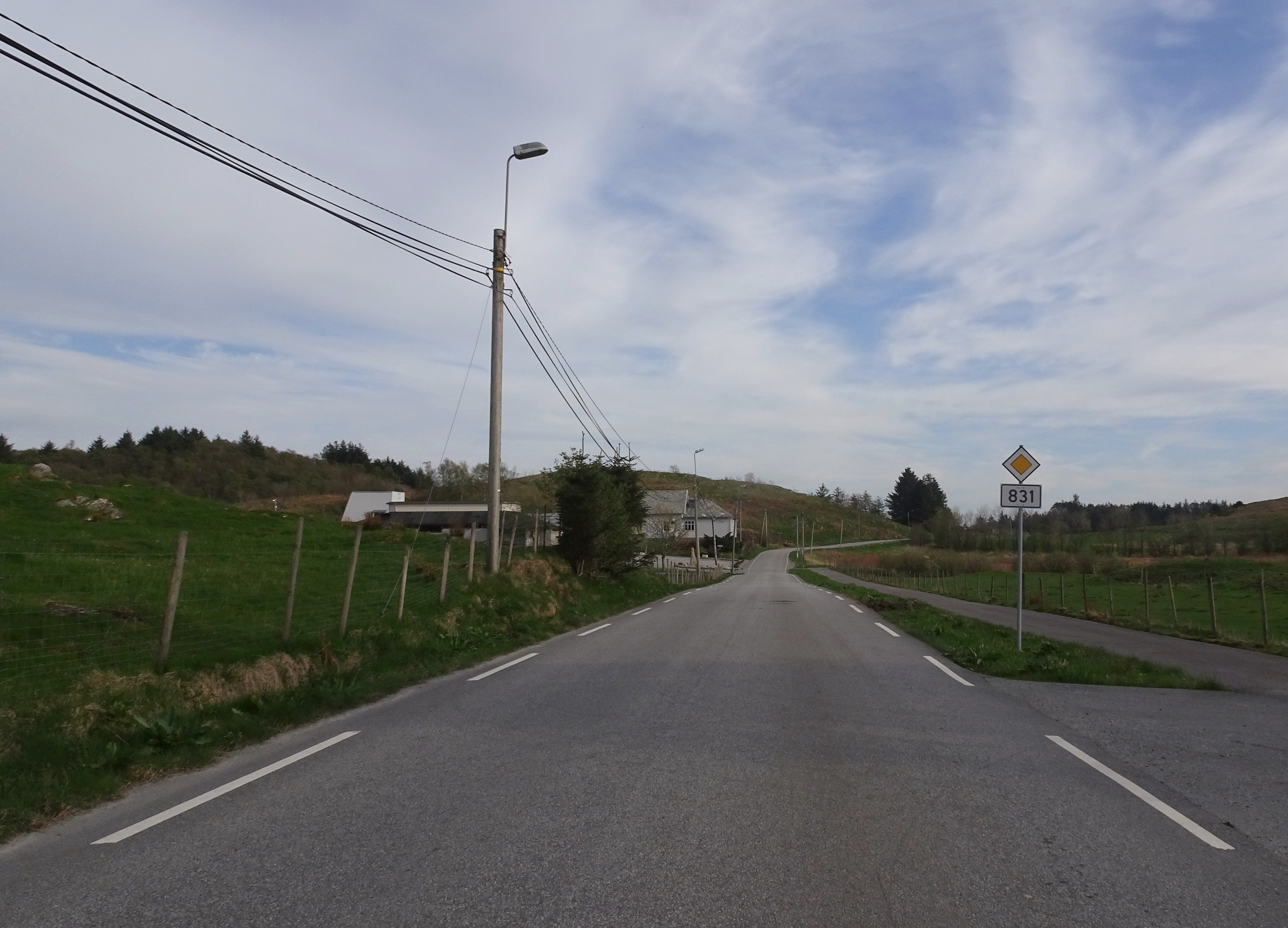 Spannavegen (fylkesvei 831) i Karmøy